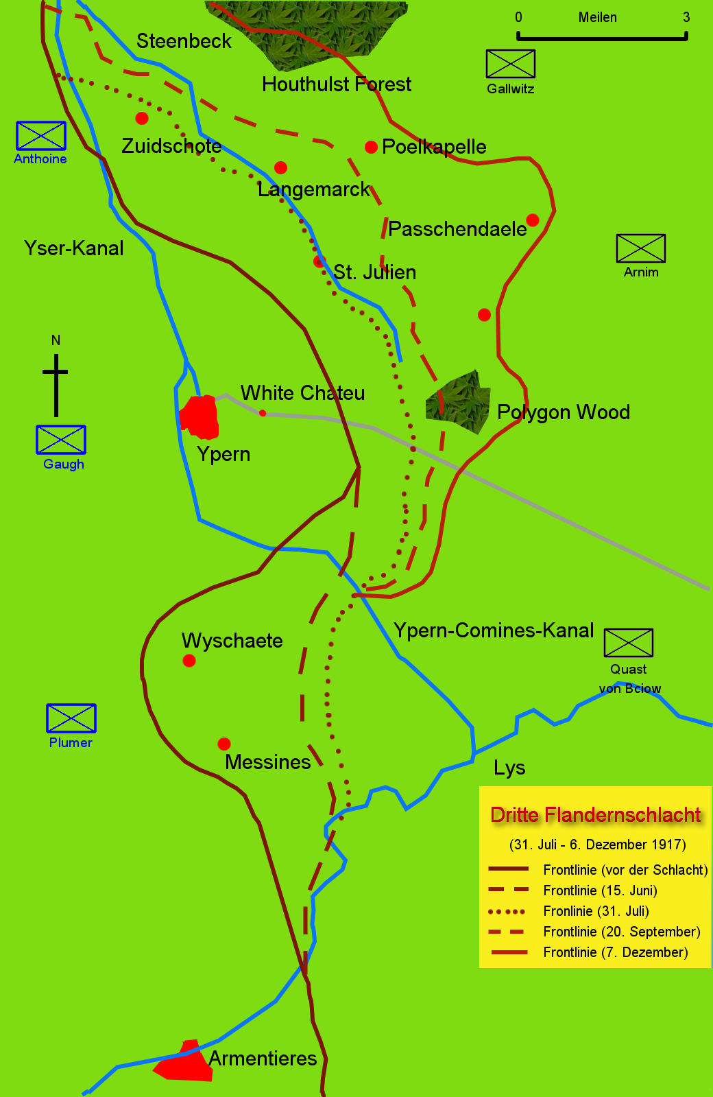 Karte zur Dritten Flandernschlacht. Die ersten beiden Linien in Dunkelrot (links) stellen den alliierten Vorstoß vor der Dritten Flandernschlacht dar. Quelle: selbst erstellt Ersteller: John N.. Map of the Battle of Passchendaele (Third Battle of Ypres). The first two lines from left (in dark red) mark the alliied progress before the actual Battle of Passchendaele. Carte du Bataille de Passchendaele.